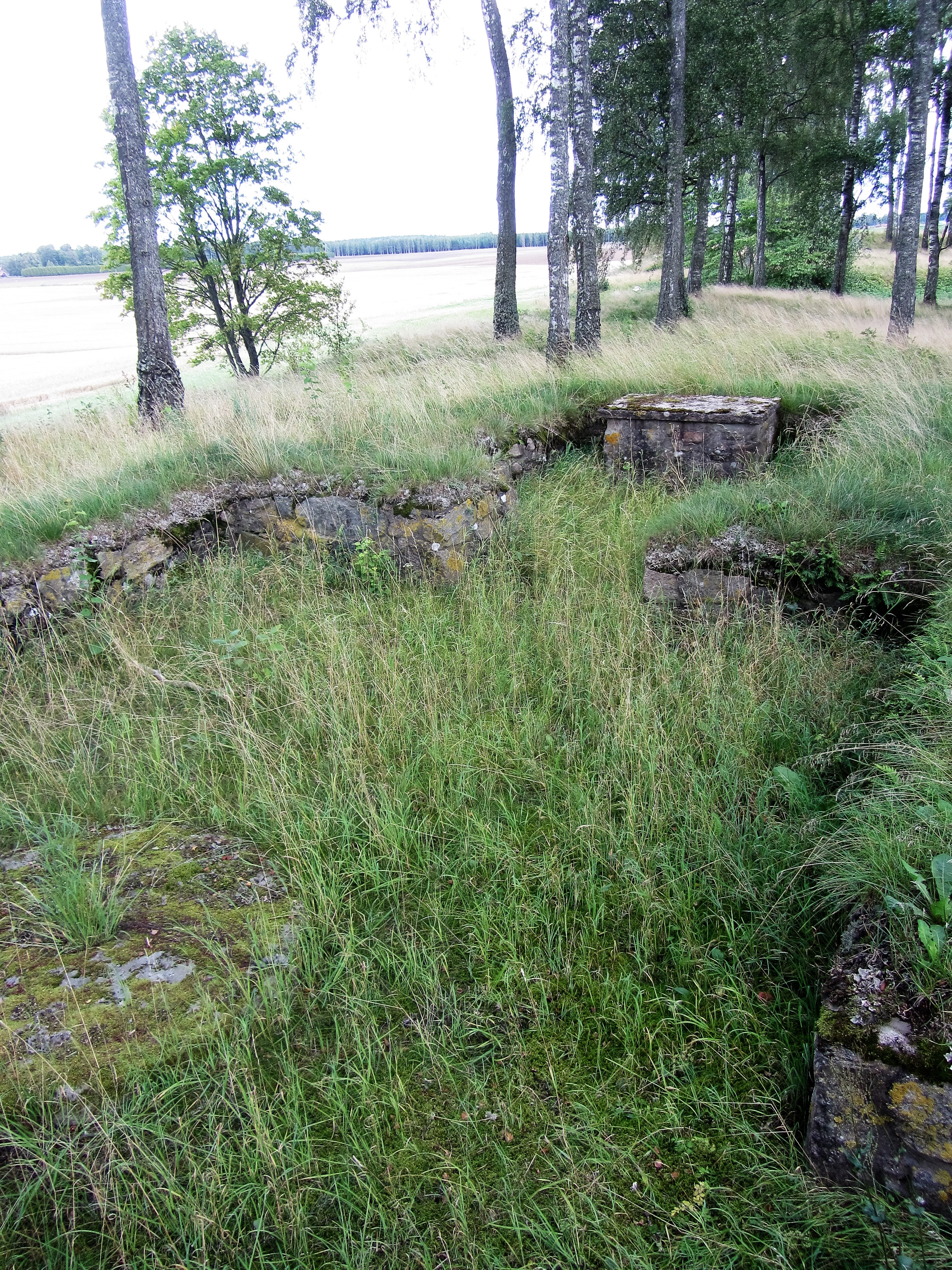 Borga kyrkoruin från väster i södra delen av Edsvära socken. Den ligger på en kulle vid en gårdsbyggnad nära Lidan som rinner i en ravin nedanför platsen. Mellan kyrkoruinen och ån och ovanför ravinen går landsvägen till Falköping.